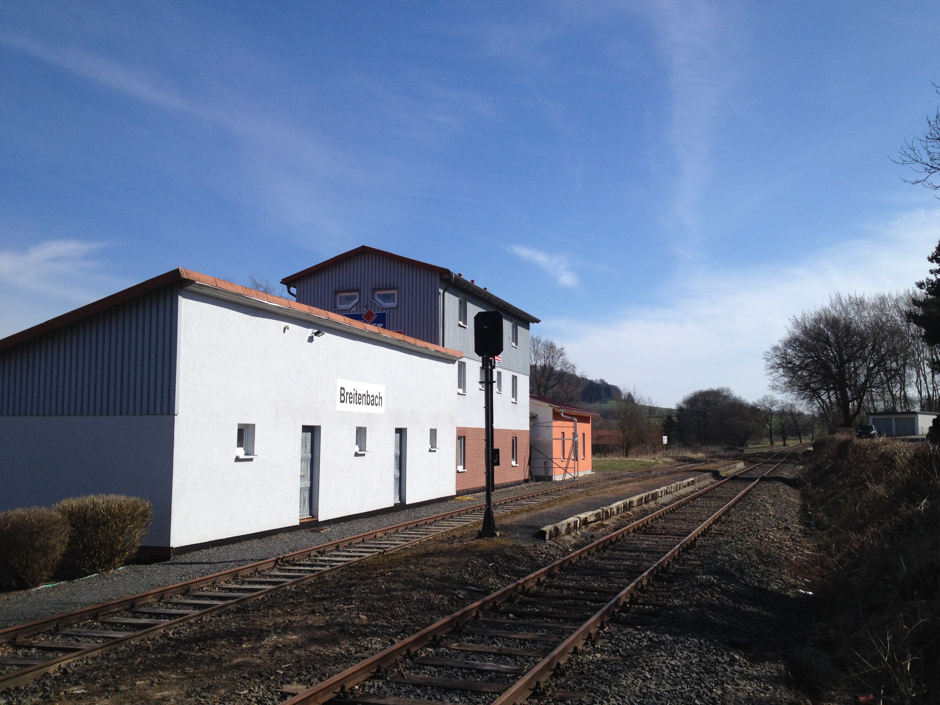 Bahnhof Schauenburg-Breitenbach; Hessencourrier